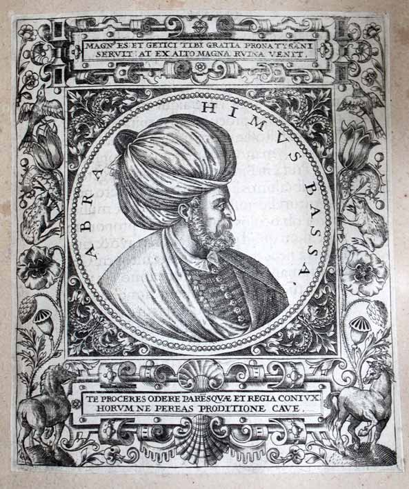 Paragli Ibrahim pasa török nagyvezír arcképe, Boissard «Vitae et icones Sultanorum Turcicorum» (Frankfurt, 1596.) című munkájában jelent meg